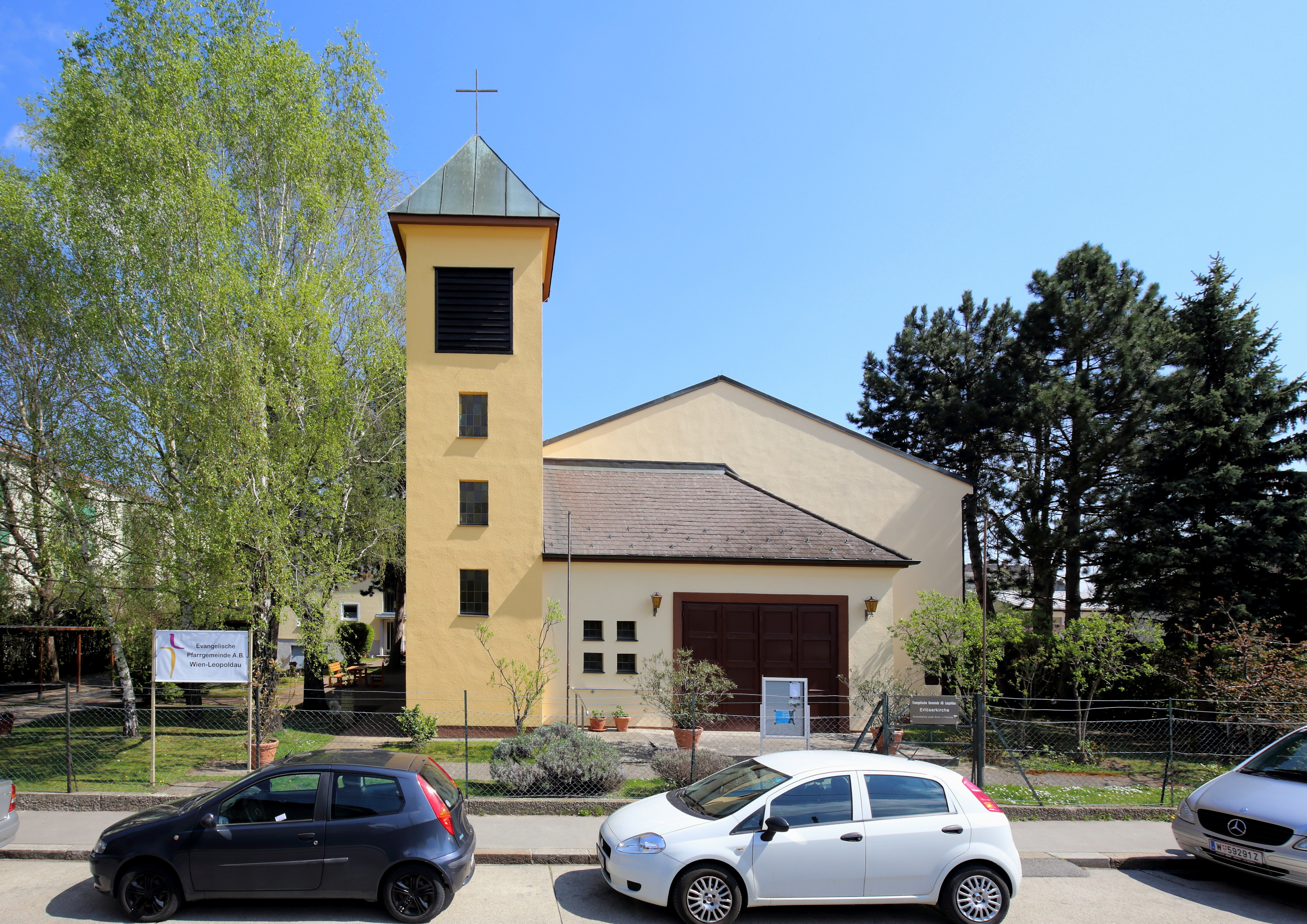 Die Erlöserkirche in Leopoldau im 21. Wiener Gemeindebezirk Floridsdorf. Die Kirche wurde nach Plänen der Architekten Ernst Liebe von 1959 bis 1961 errichtet.